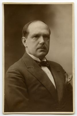 Hans Madissoon